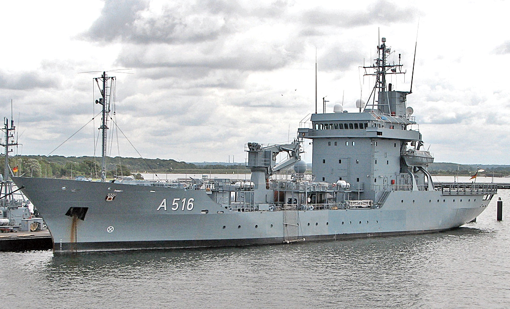 Dieses Bild zeigt den Tender Donau (A516) im Marinestützpunkt "Hohe Düne" anlässlich der Hanse Sail 2005.